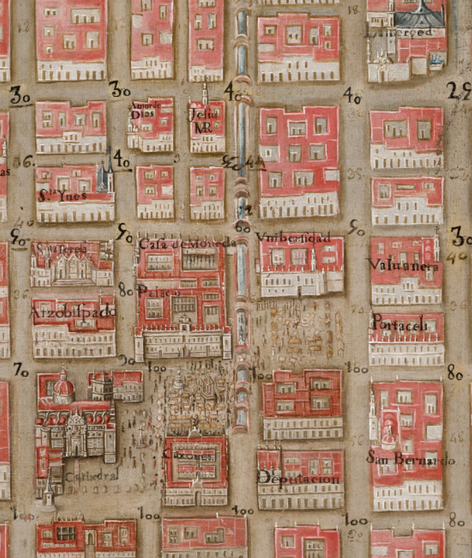 Plano de la Ciudad de México, por Pedro de Arrieta. En ella se encuentra junto al palacio del virrey un canal y al lado la Universidad